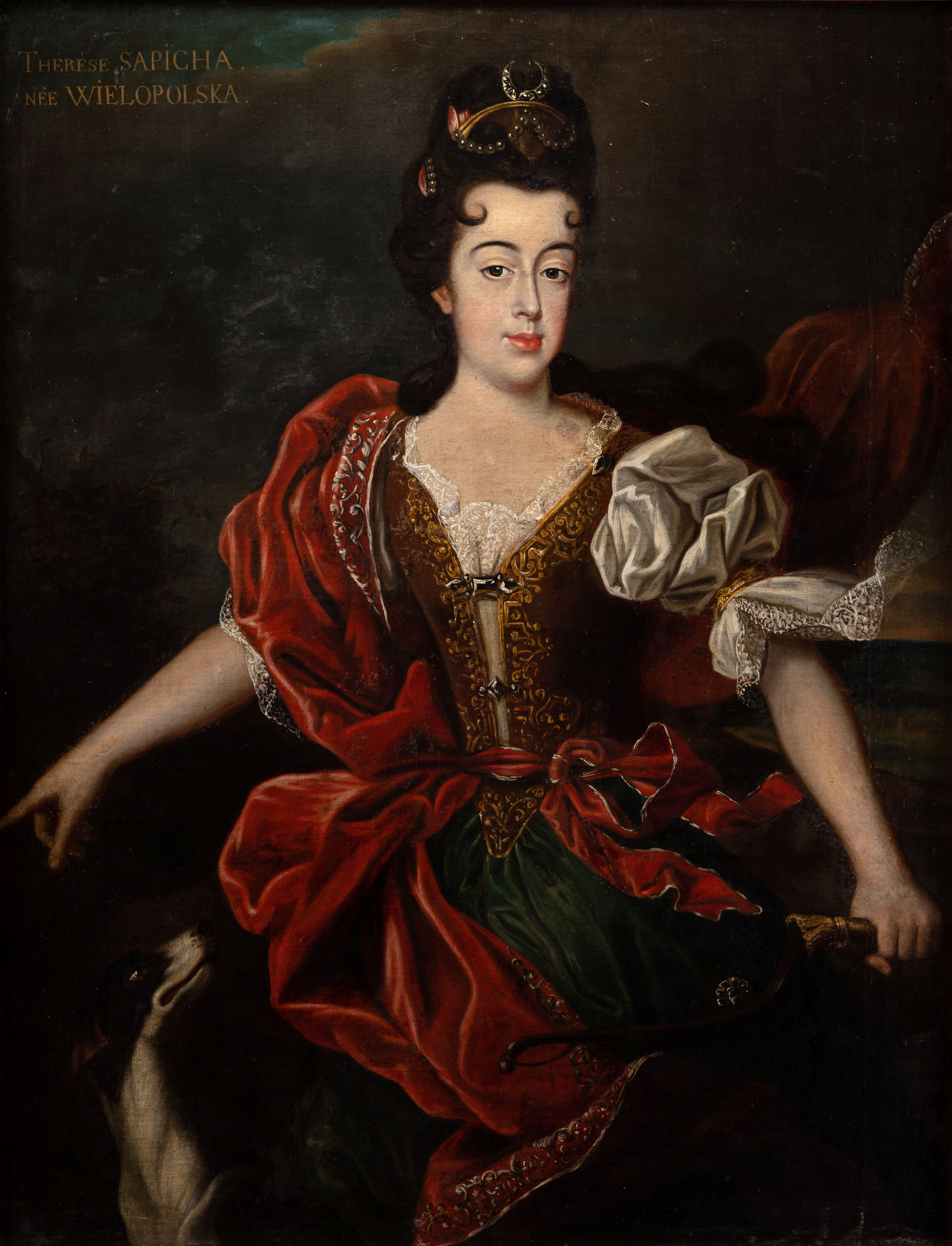 Беларуская (тарашкевіца): Партрэт Тэрэзы Сапега (зь Веляпольскіх)